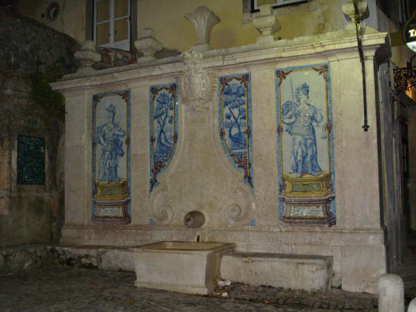 Fonte da Pipa (Sintra) - Fotografia de Carlos Botelho para a Wikipédia